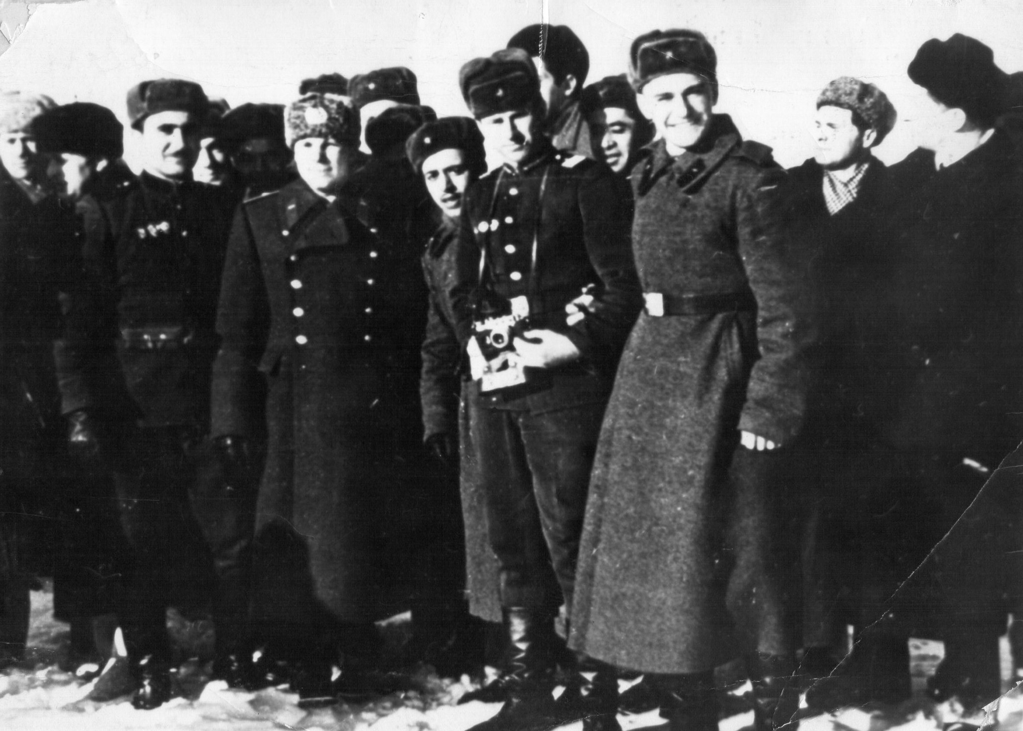 Встреча с Ю. А. Гагариным